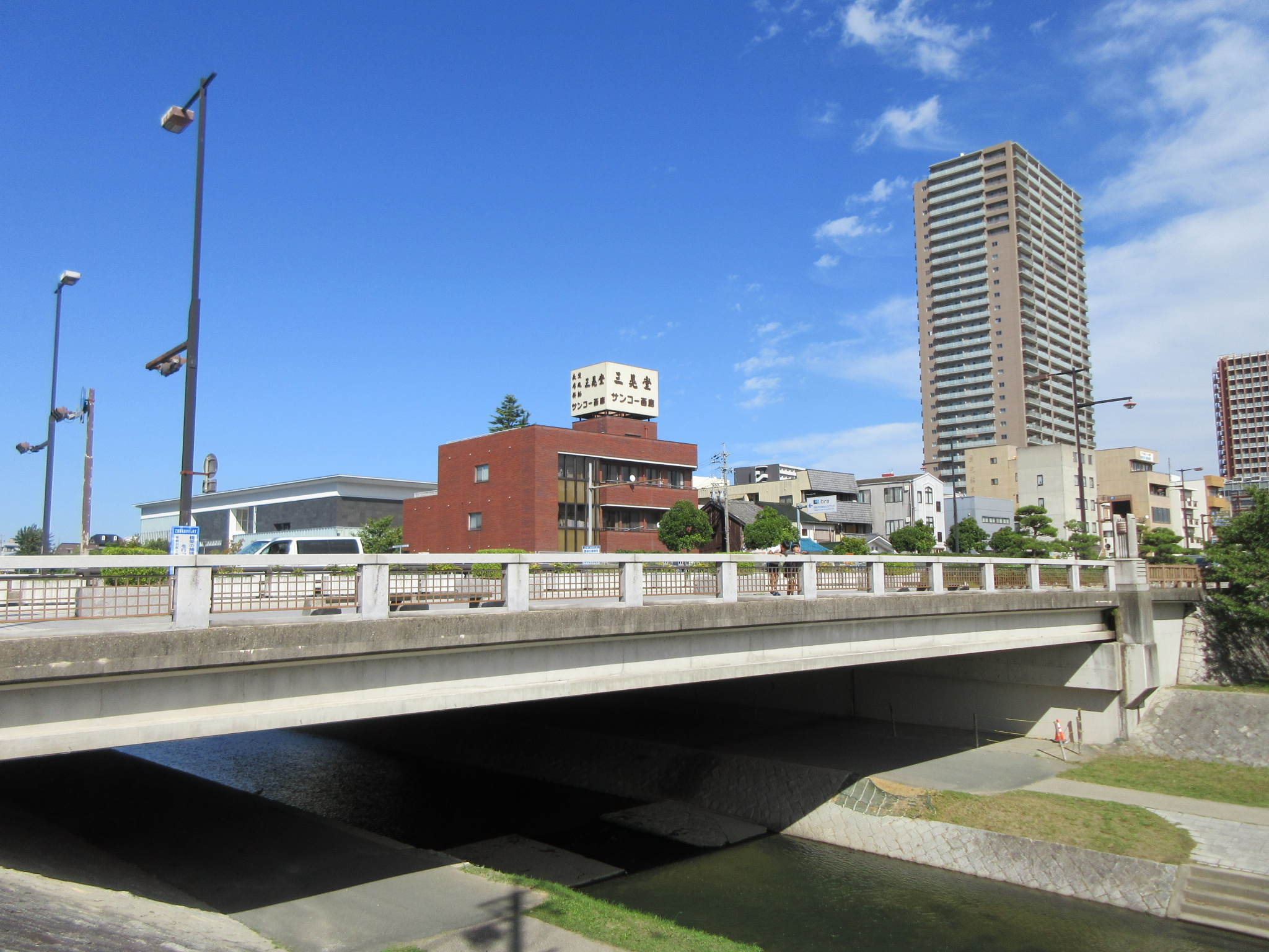 伊賀川にかかる龍城橋。国道1号。岡崎市康生町。